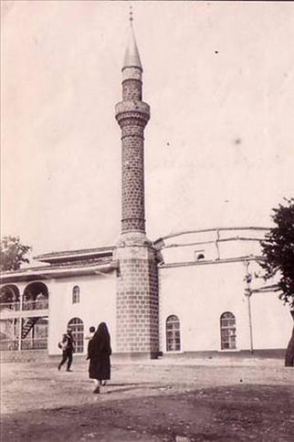 Cumhuriyet yıllarında Muğla. Resimke Kurşunlu Camiinin batı cephesi ve şimdi Kurşunlu Caddesi olan alan görülmektedir.